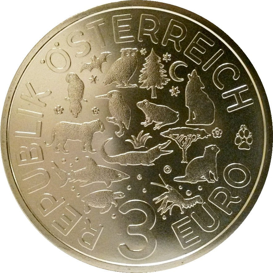 Die Fledermaus — Österreich 3 Euro‚ Buntmetall, d=34 mm, Ausgabe ab 5. Oktober 2016, Auflage 50.000, Designerː Mag. Helmut Andexlinger